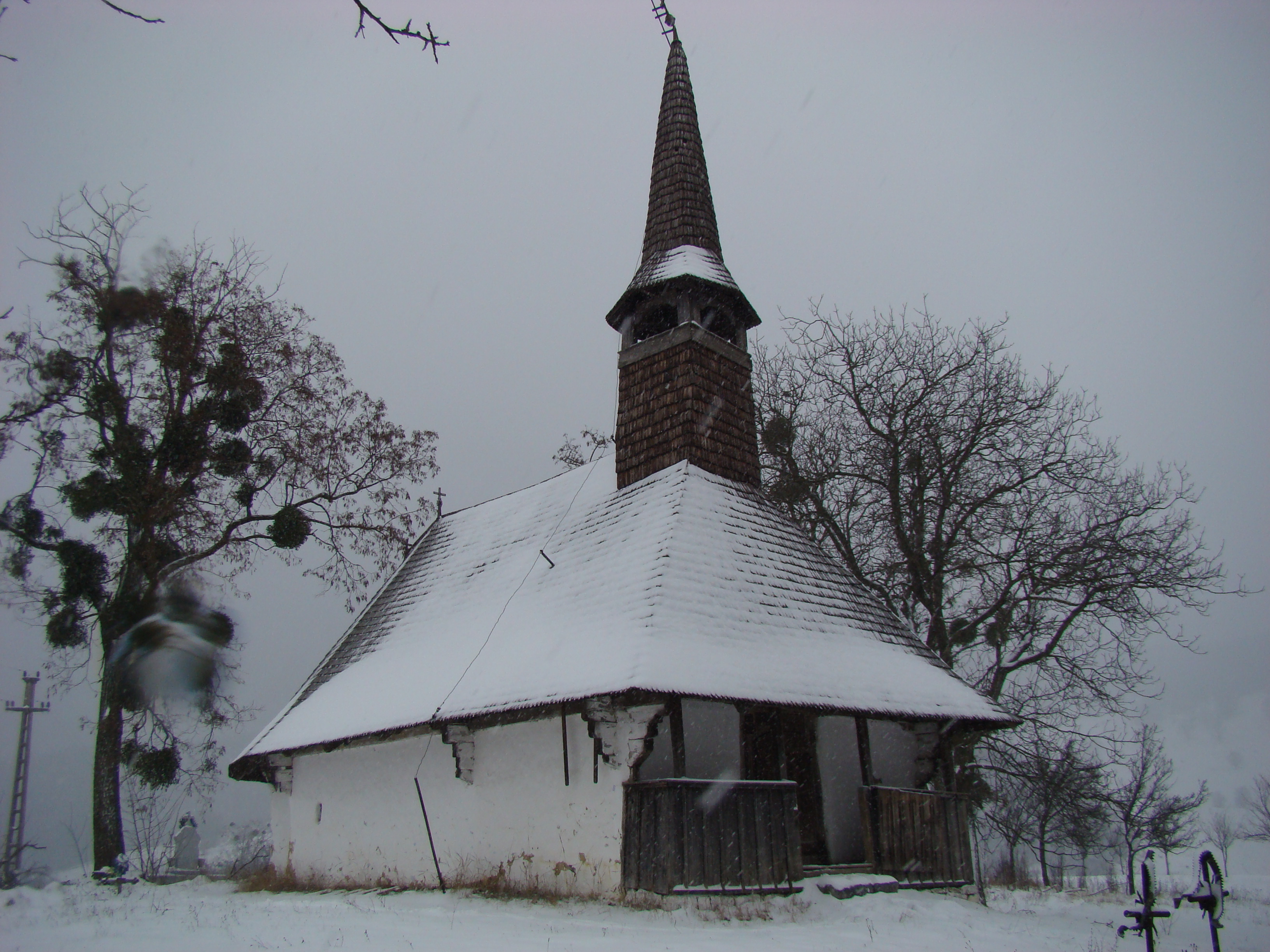 Fâșca, Bihor